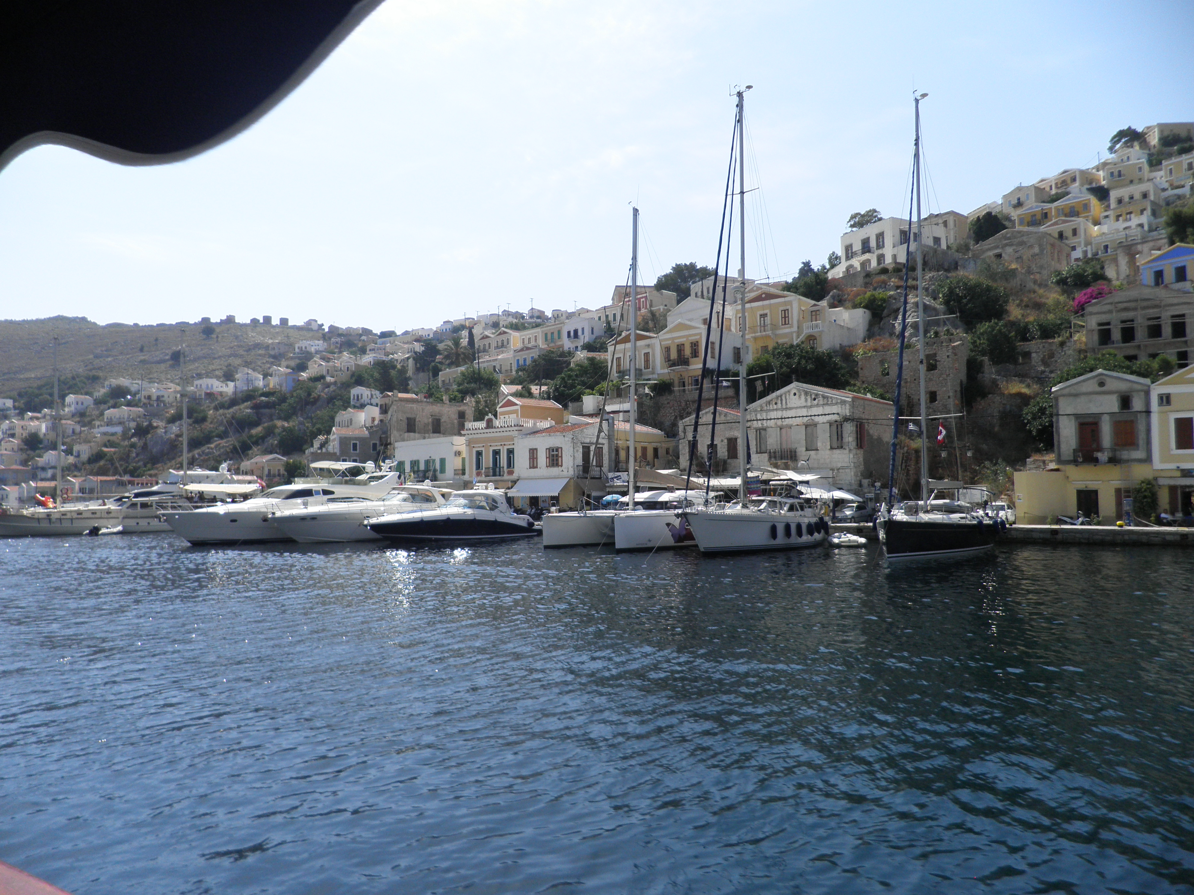 στο λιμάνι της σύμης